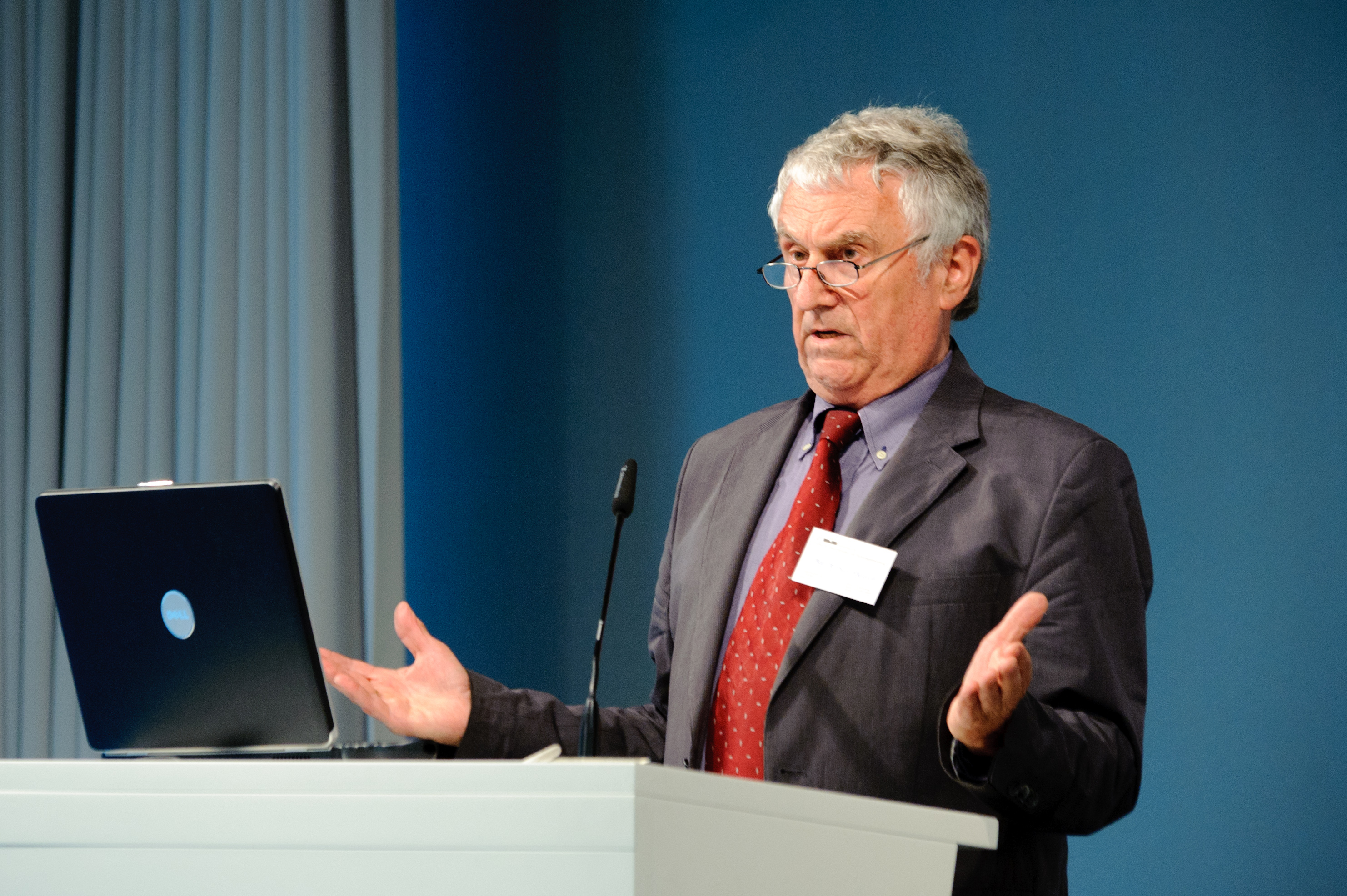 Rolf Kreibich (Prf., Wiss. Direktor u. Geschäftsführer IZT) Foto: Stephan Röhl